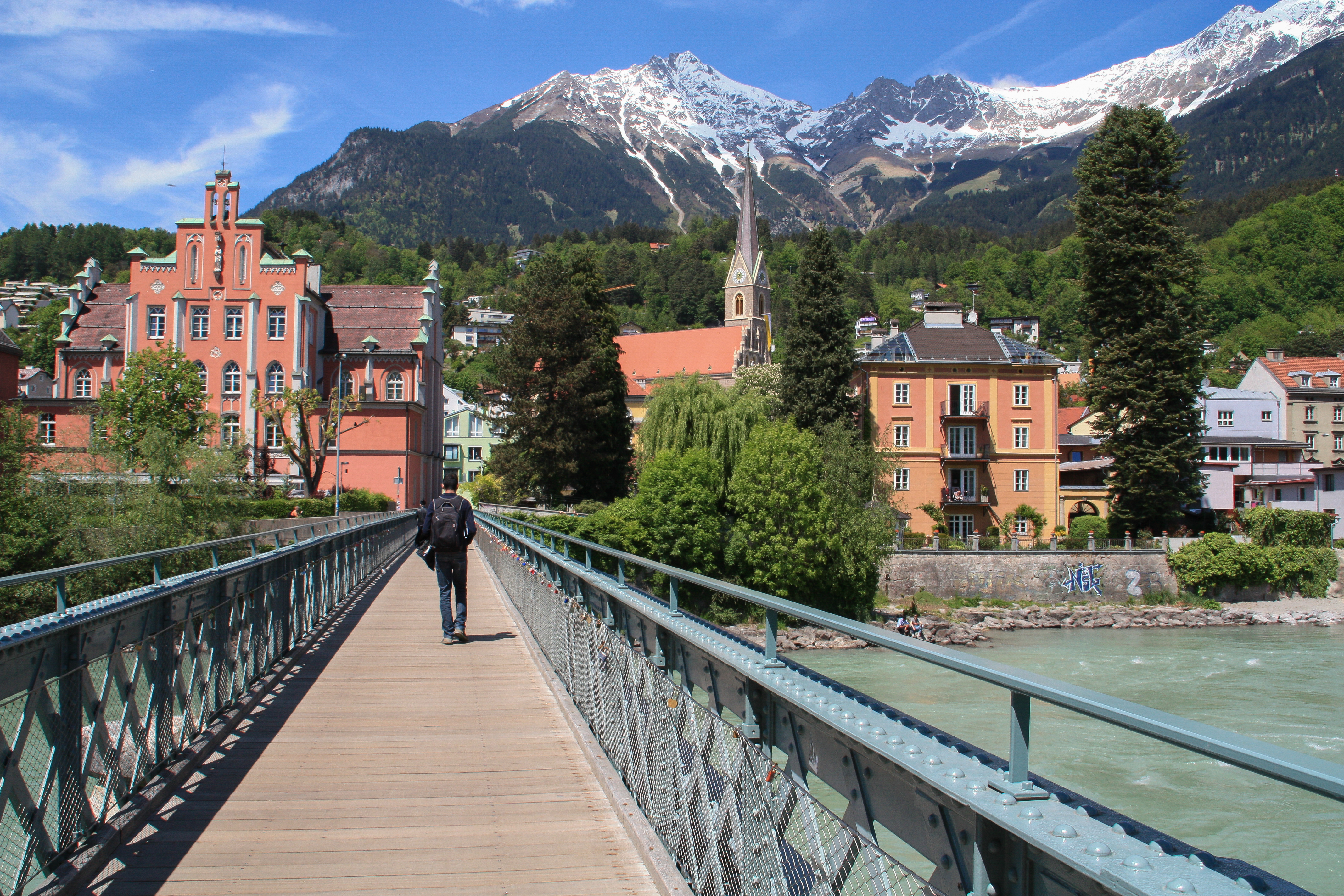 Innsbruck, Emile-Béthouart-Steg, Blick Richtung St. Nikolaus